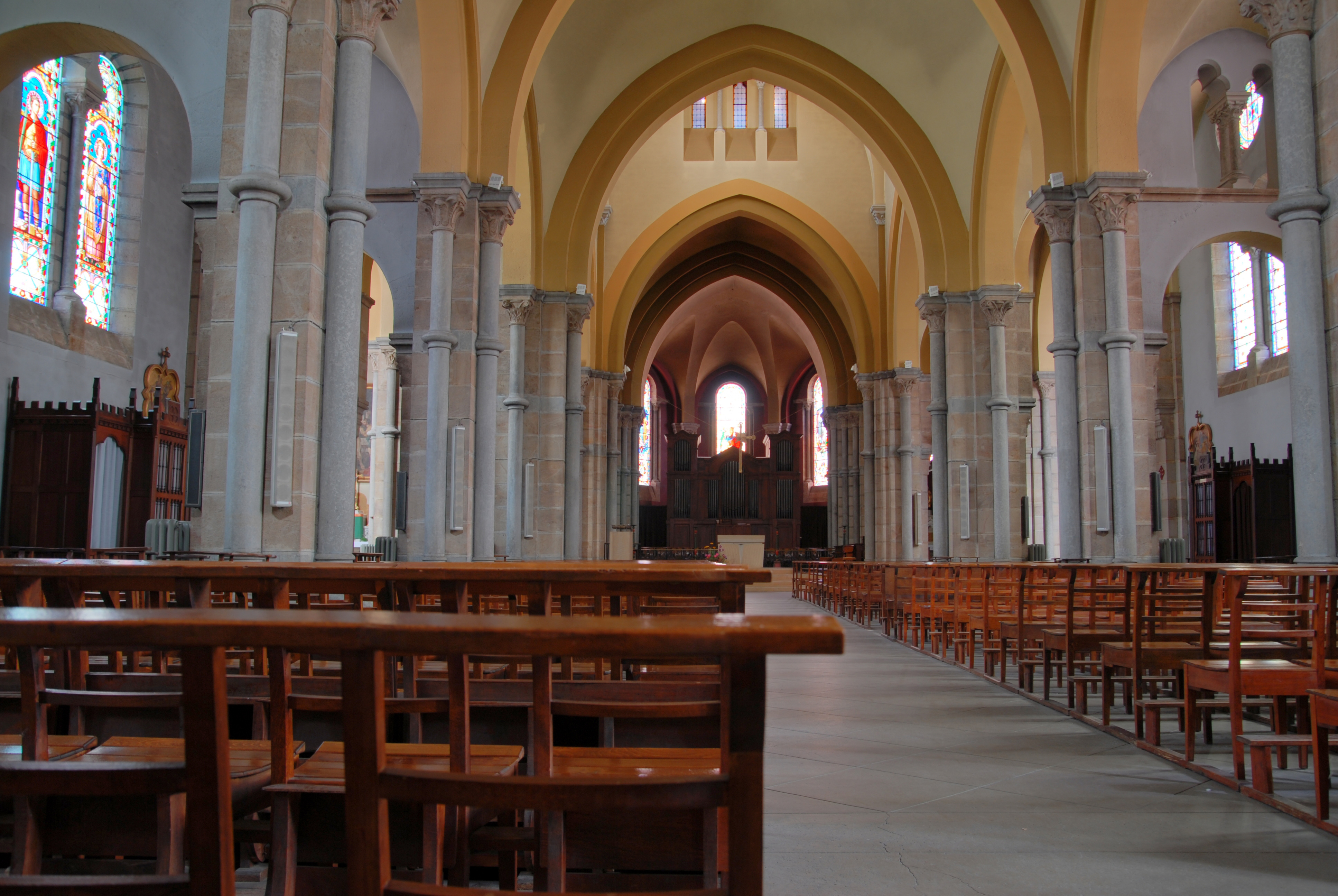 Eglise de Privas